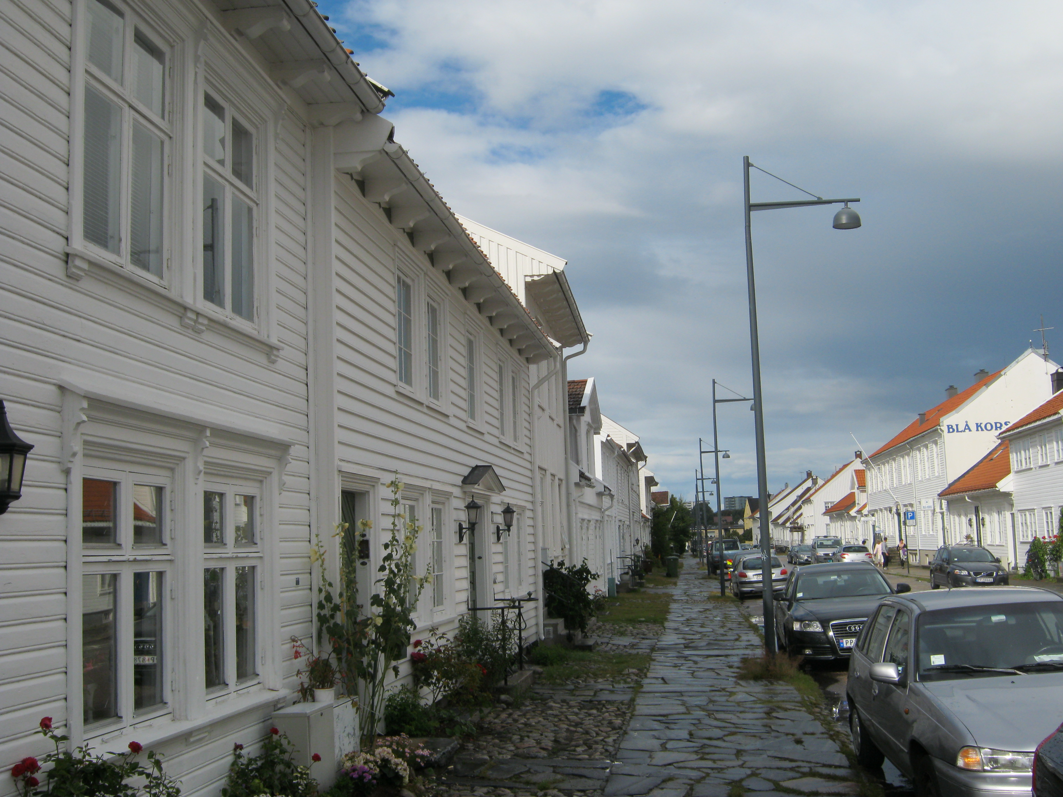 Gyldenløves gate, Kristiansand